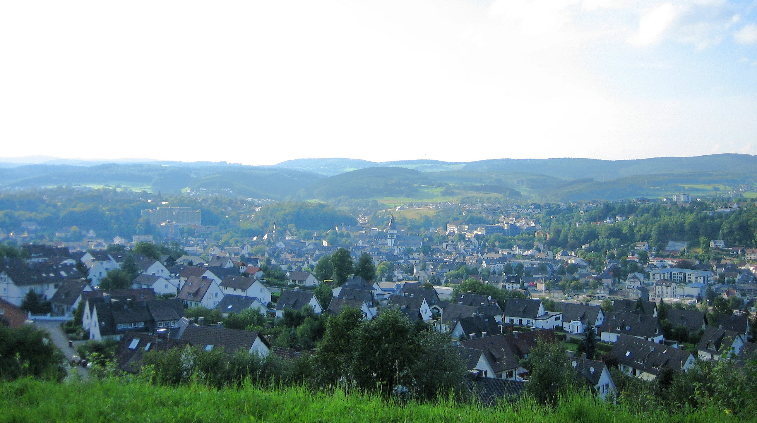 Attendorn aus Richtung Südosten